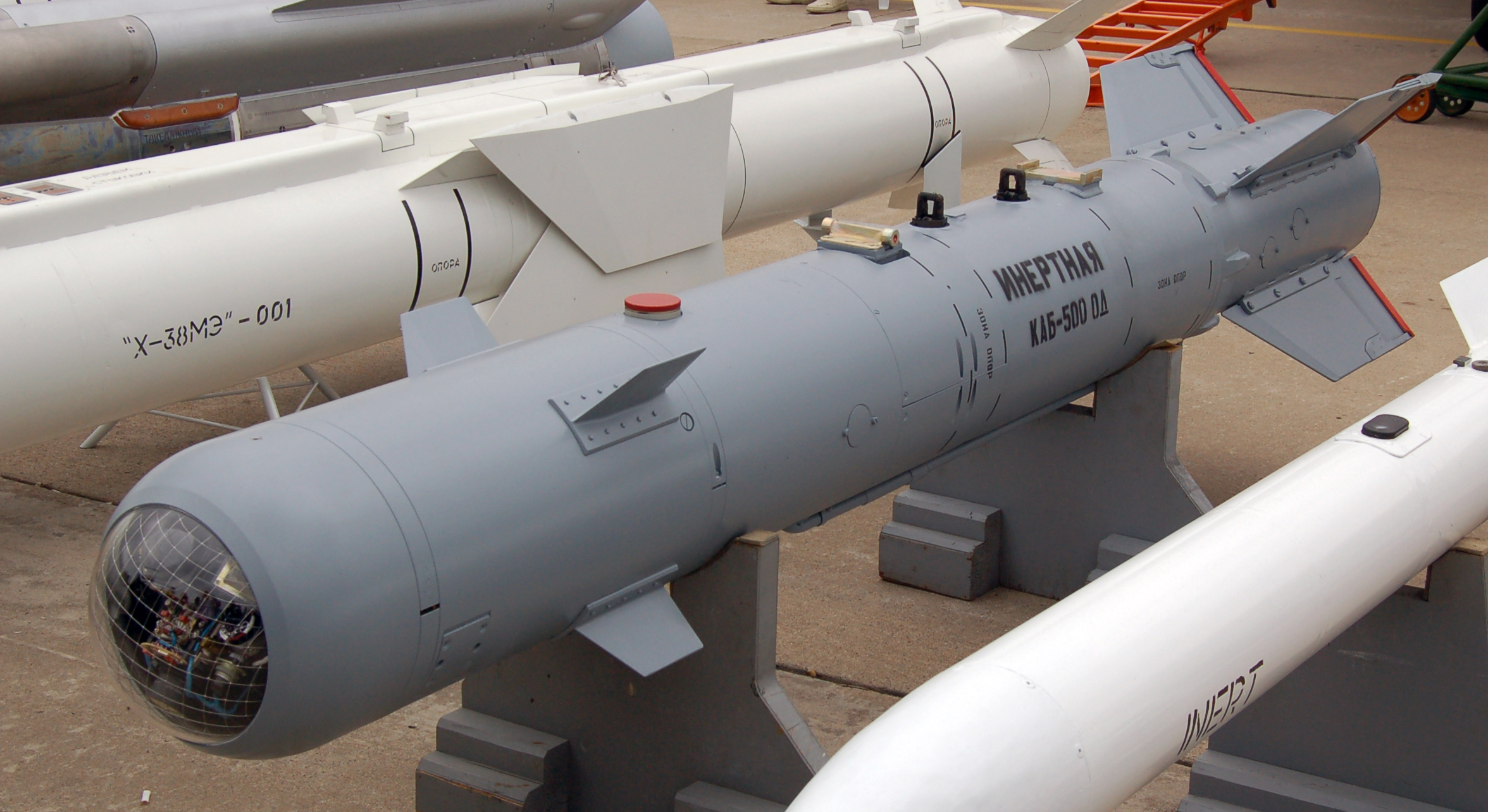 Корректируемая авиабомба калибра 500 килограмм с объёмно-детонирующей боеголовкой КАБ-500ОД на МАКС2009